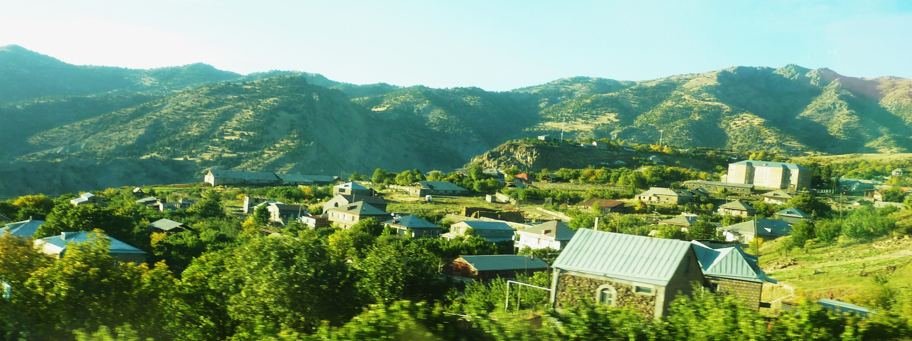 Vernashen, Village arménien près d'Eghenadzor